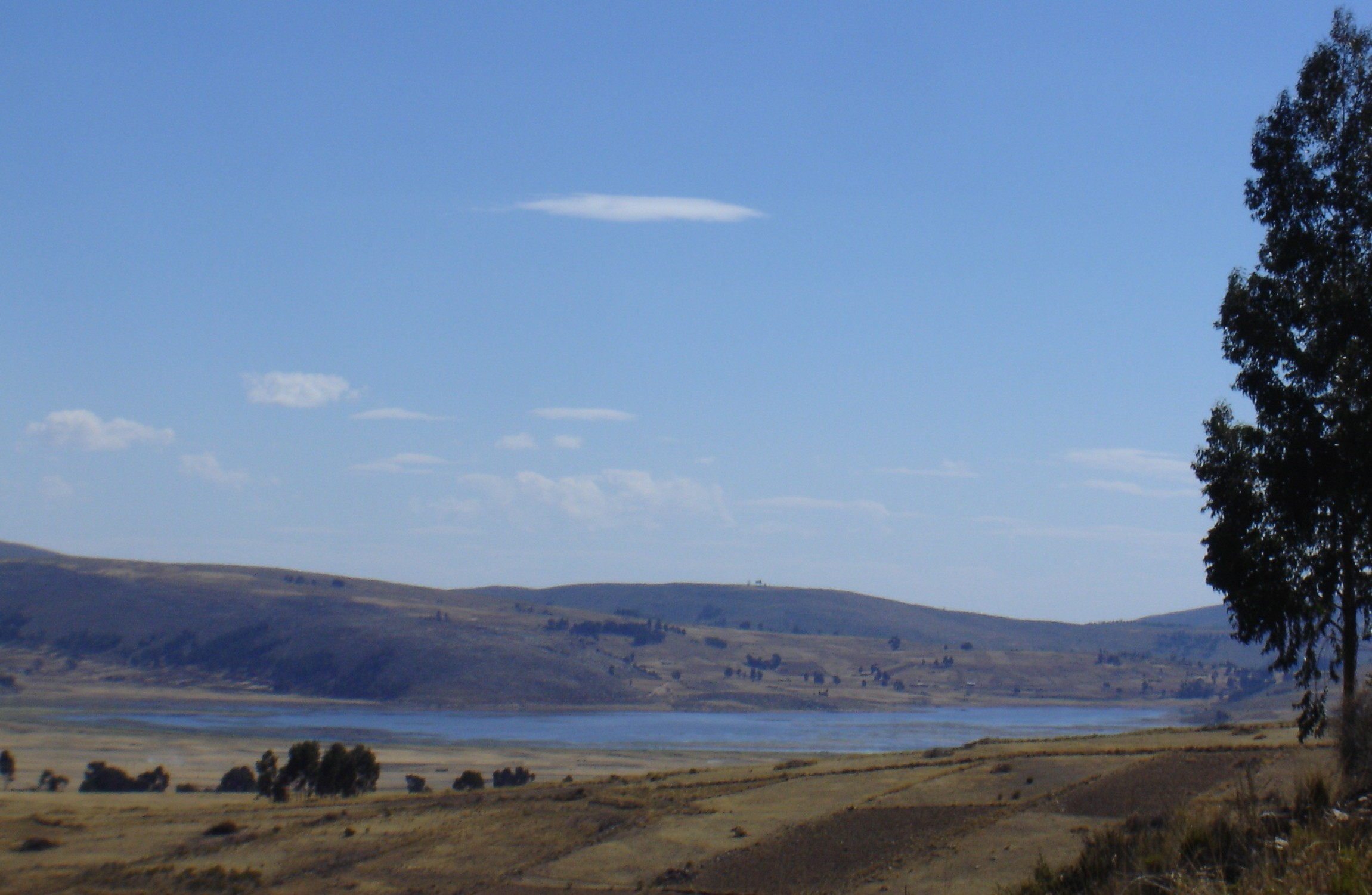 La Laguna Parquqhucha se encuentra al oeste de la Población de Vacas. Una vista parcial.